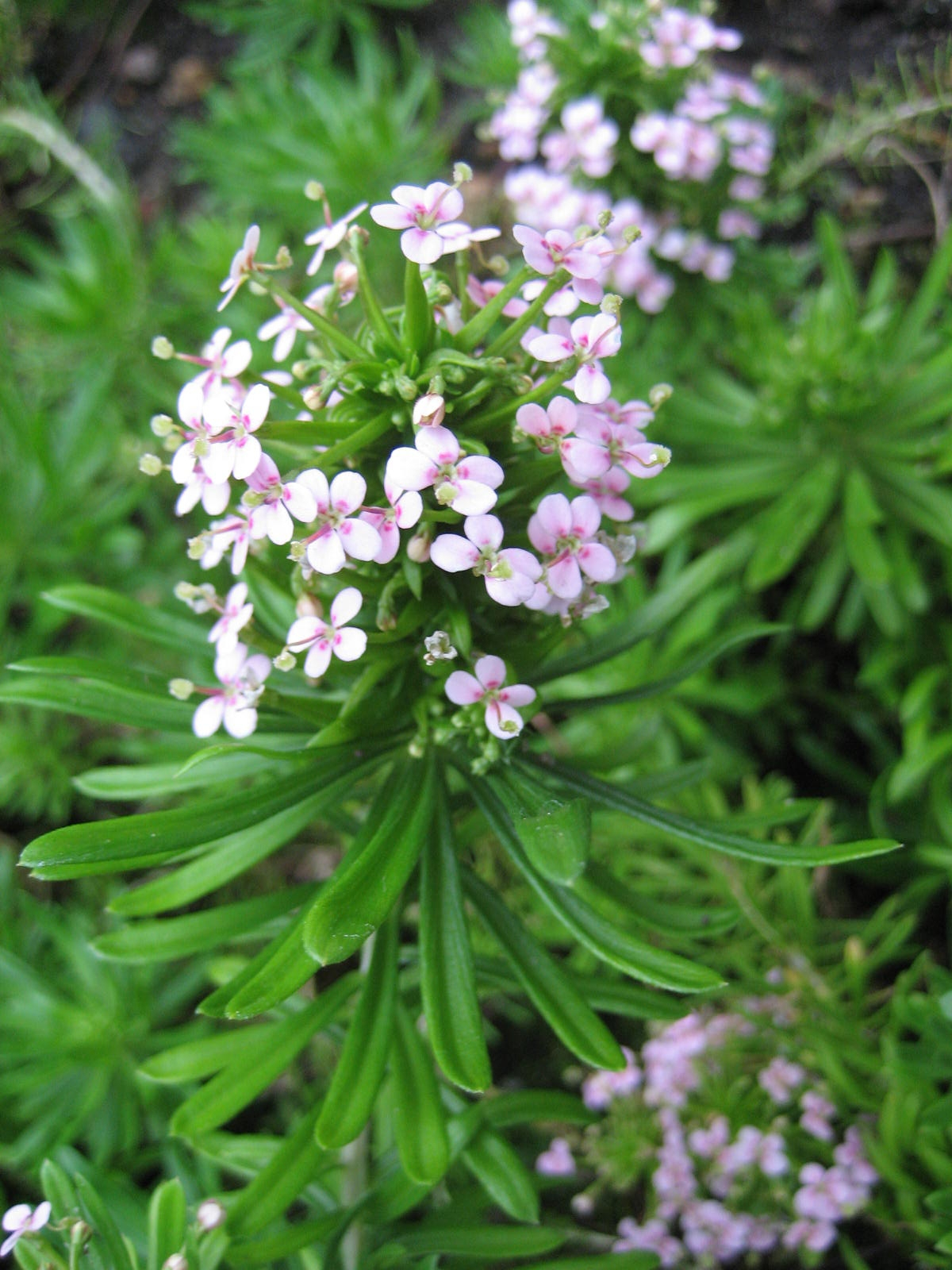 Stylidium adnatum - Inflorescens - Bot. Garten Berlin Dahlem